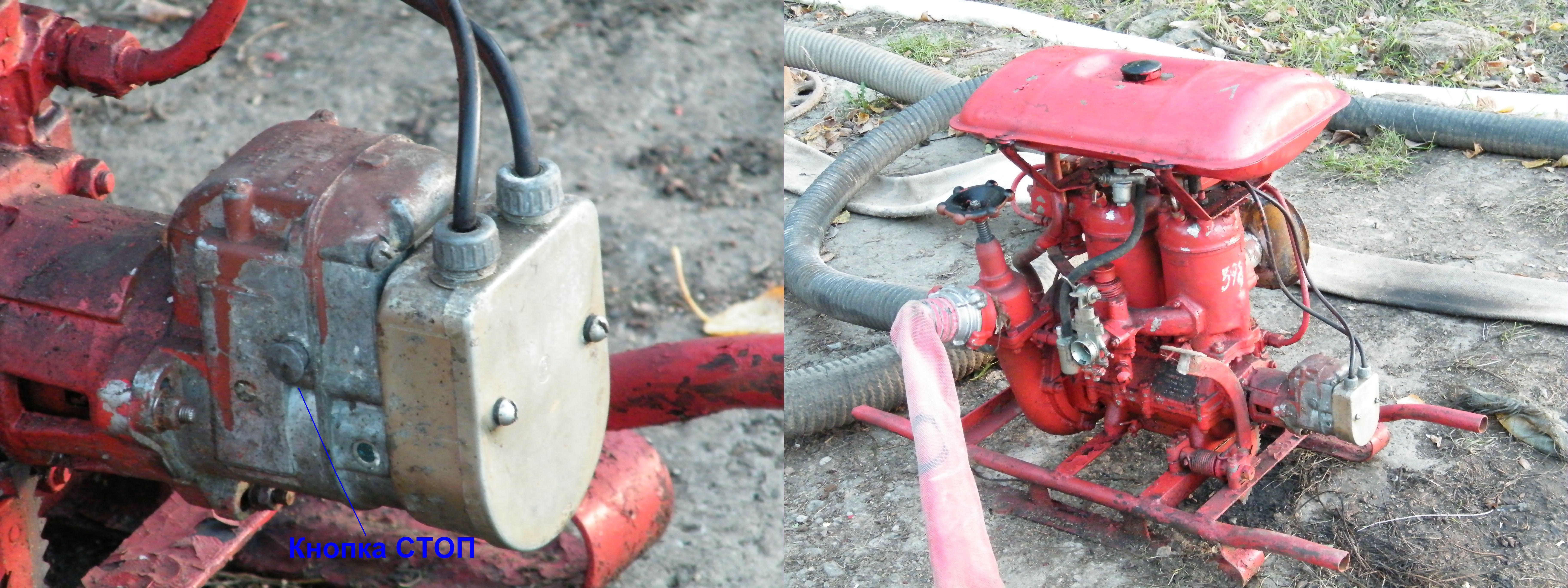 Пожарная помпа магнето